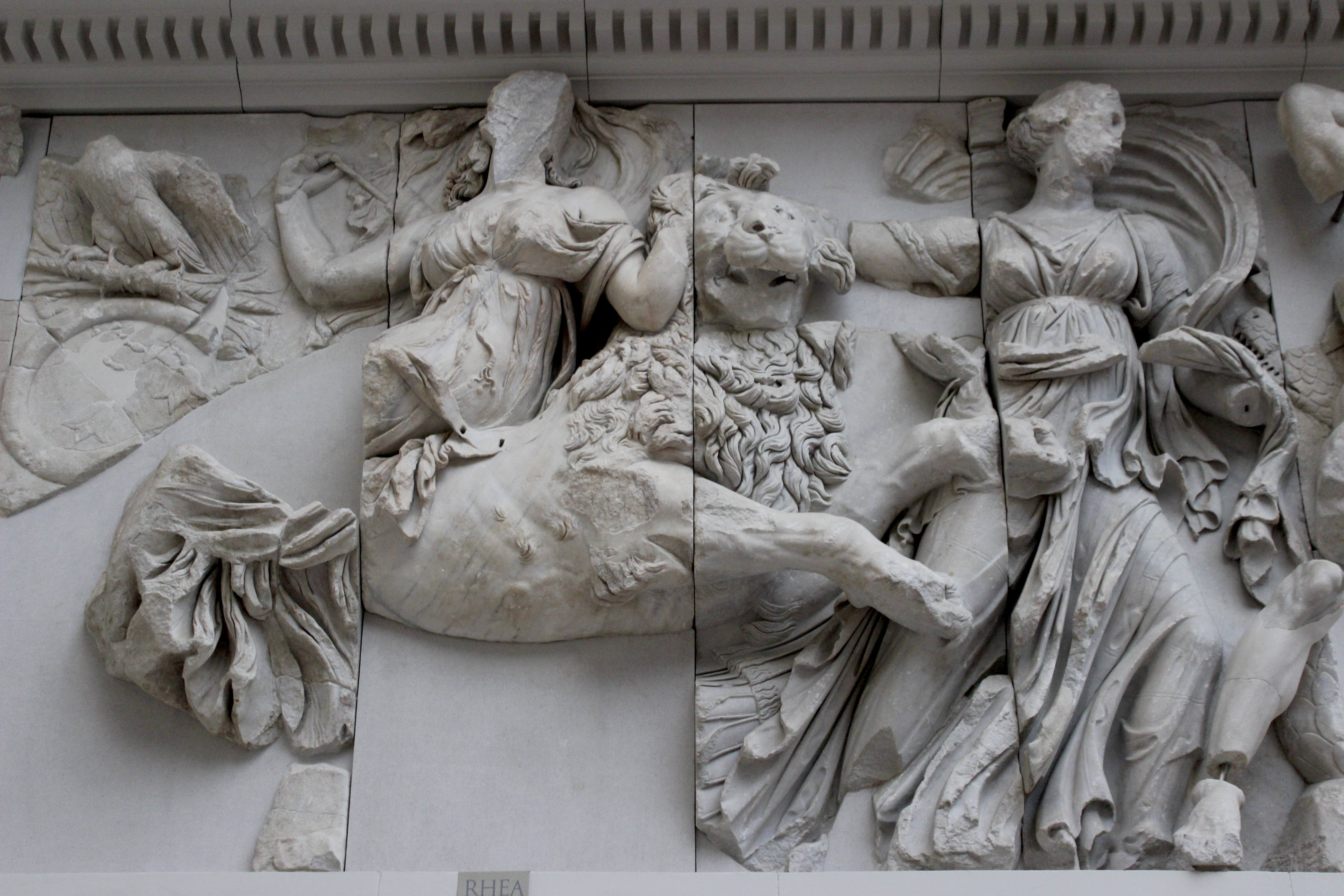 Reha lucha contra los gigantes. Altar de Pérgamo.